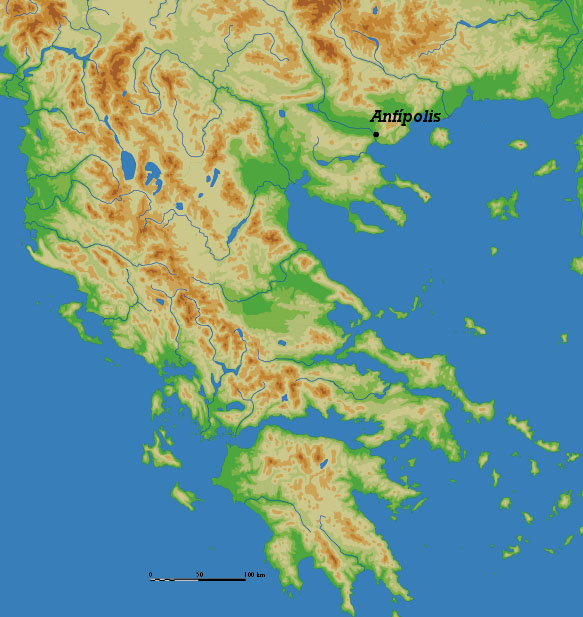 Ubicación de Anfípolis.